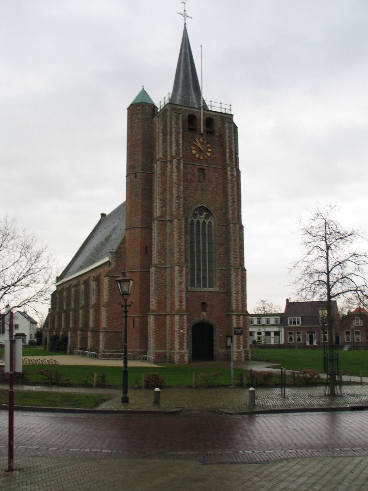 Kerk Renesse